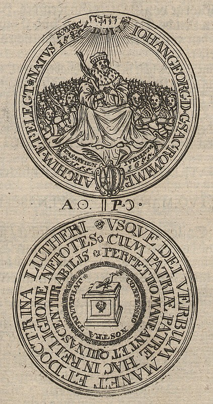 Original image description from the Deutsche Fotothek Münze & Gedenkmünze & Schaumünze & Medaille